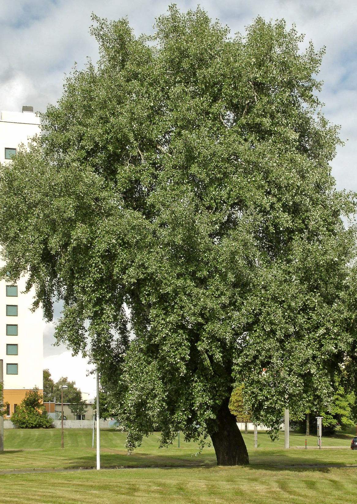 Eine unter Naturschutz stehende Graupappel, Thiemstraße, Cottbus (ND 74)